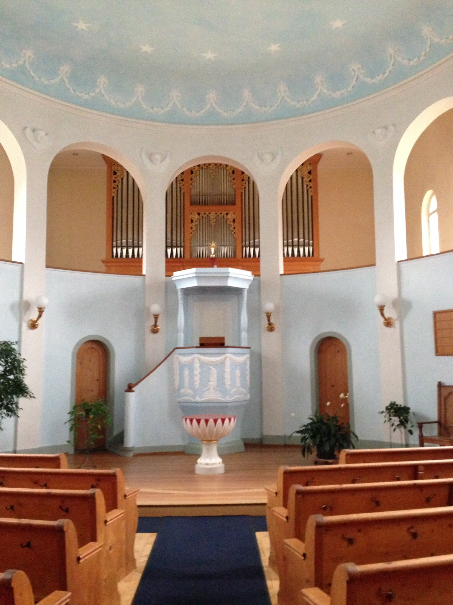 Innenraum der reformierten Kirche in Landquart GR